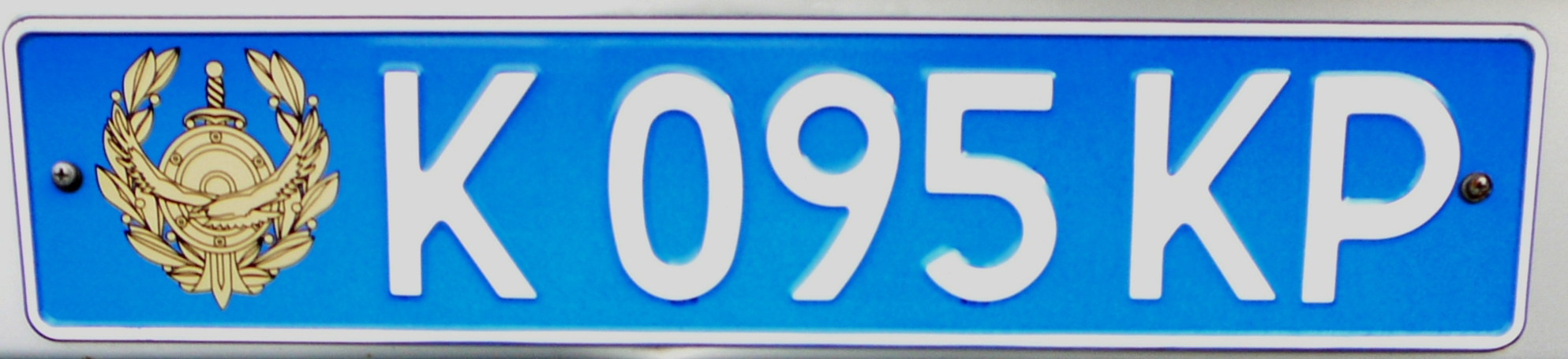 Номер служебного автомобиля МВД Республики Казахстан принадлежащий Южному Региональному Управлению по Борьбе с Организованной Преступностью. Ранее серия "К" - принадлежала несуществующей ныне Жезказганской области.